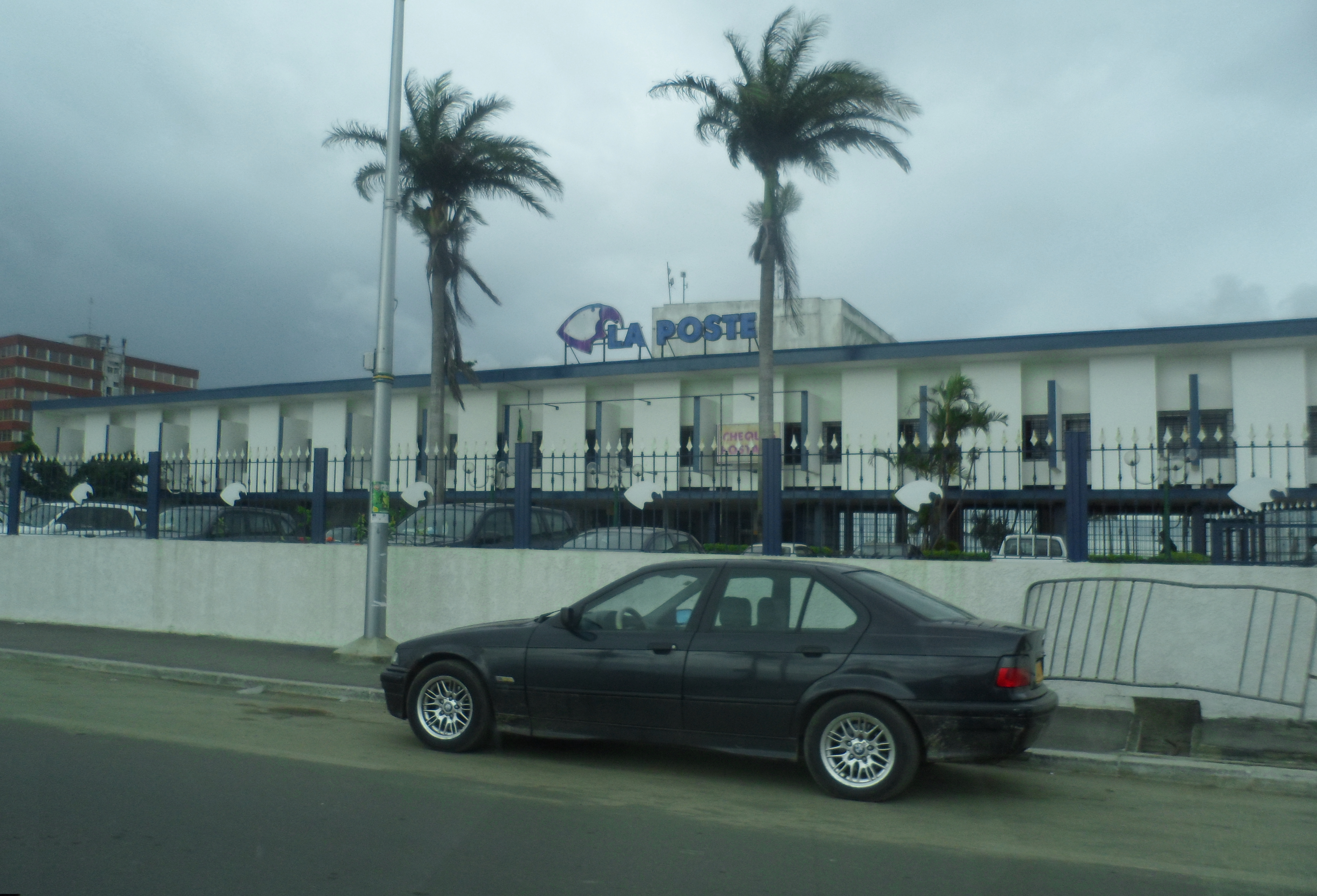 Batiment de la poste à Libreville (Gabon)